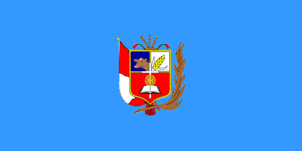 Bandera de Llapa